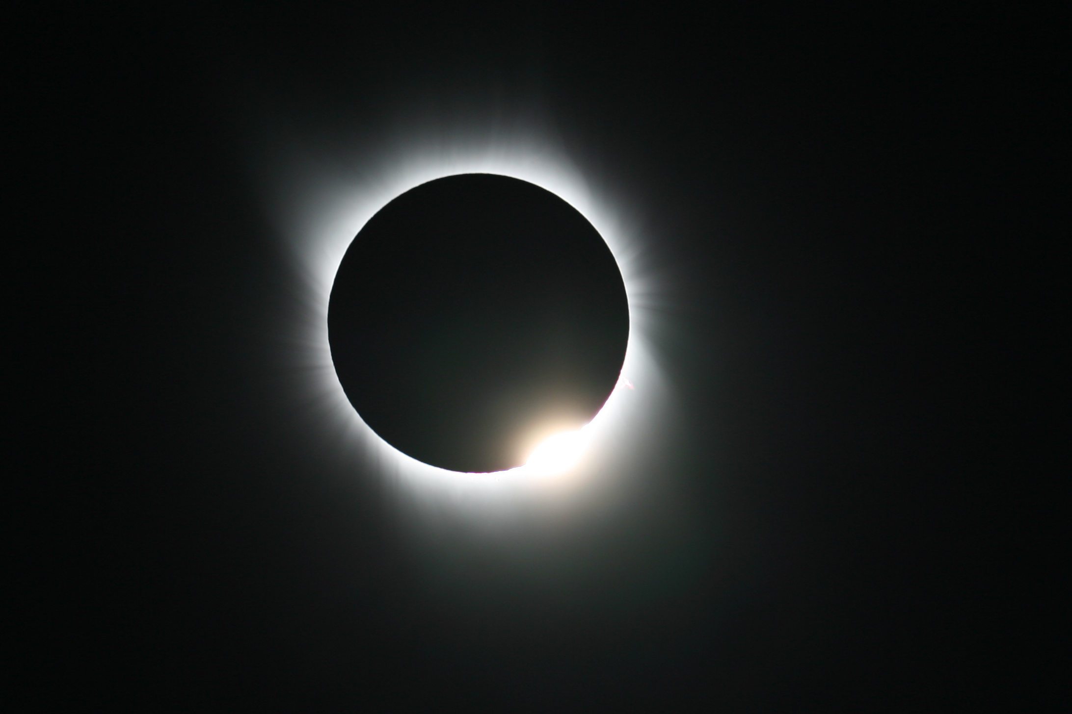 日全食生光时的钻石环效应，摄于2008年8月1日19:10:02，地点：新疆伊吾县苇子峡。 相机的时间显示有误差，这里的时间是校正过的北京时间。图片经过PHOTOSHOP作裁剪处理。